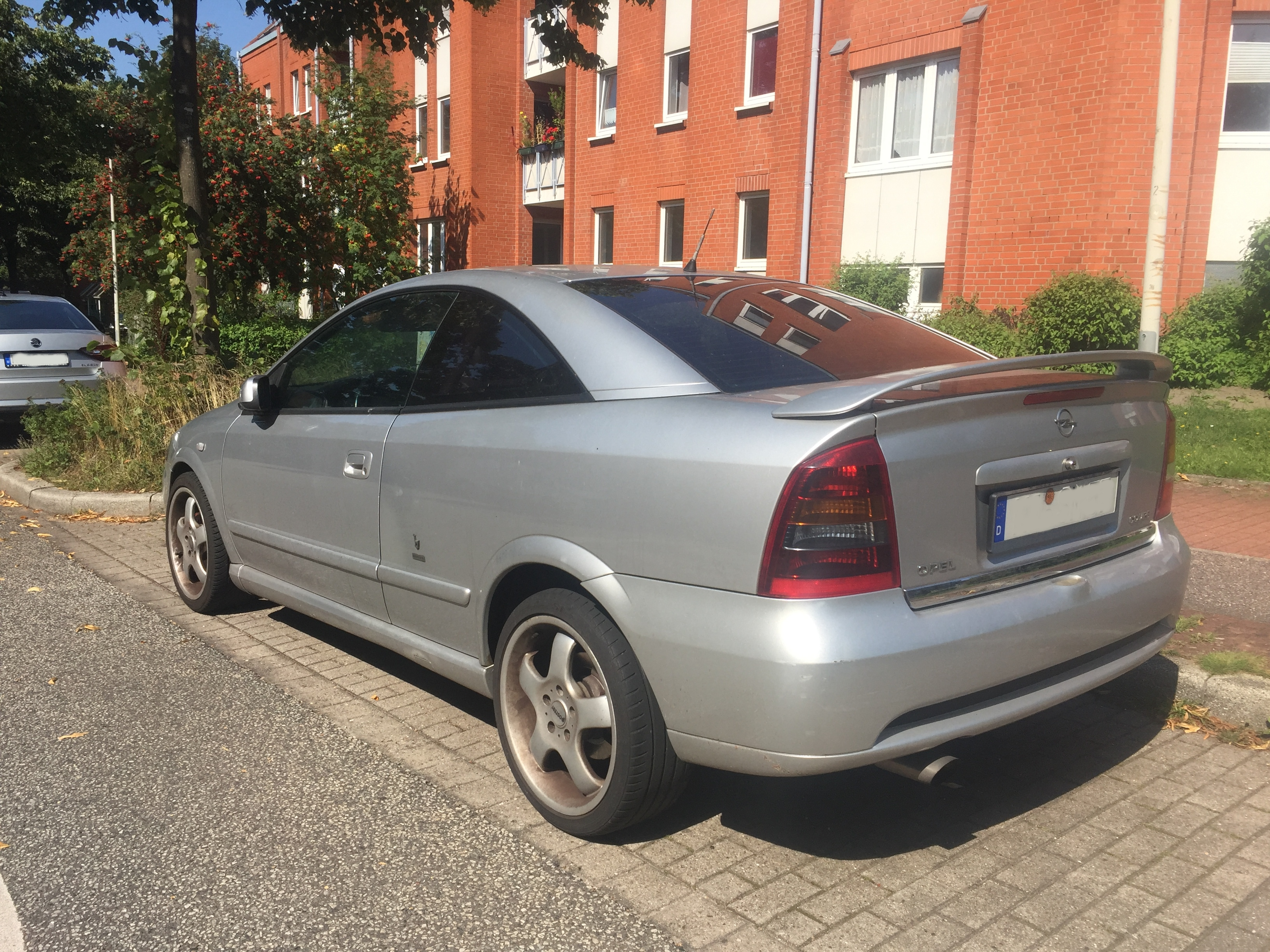 Opel Astra G Coupe "Classic Line"